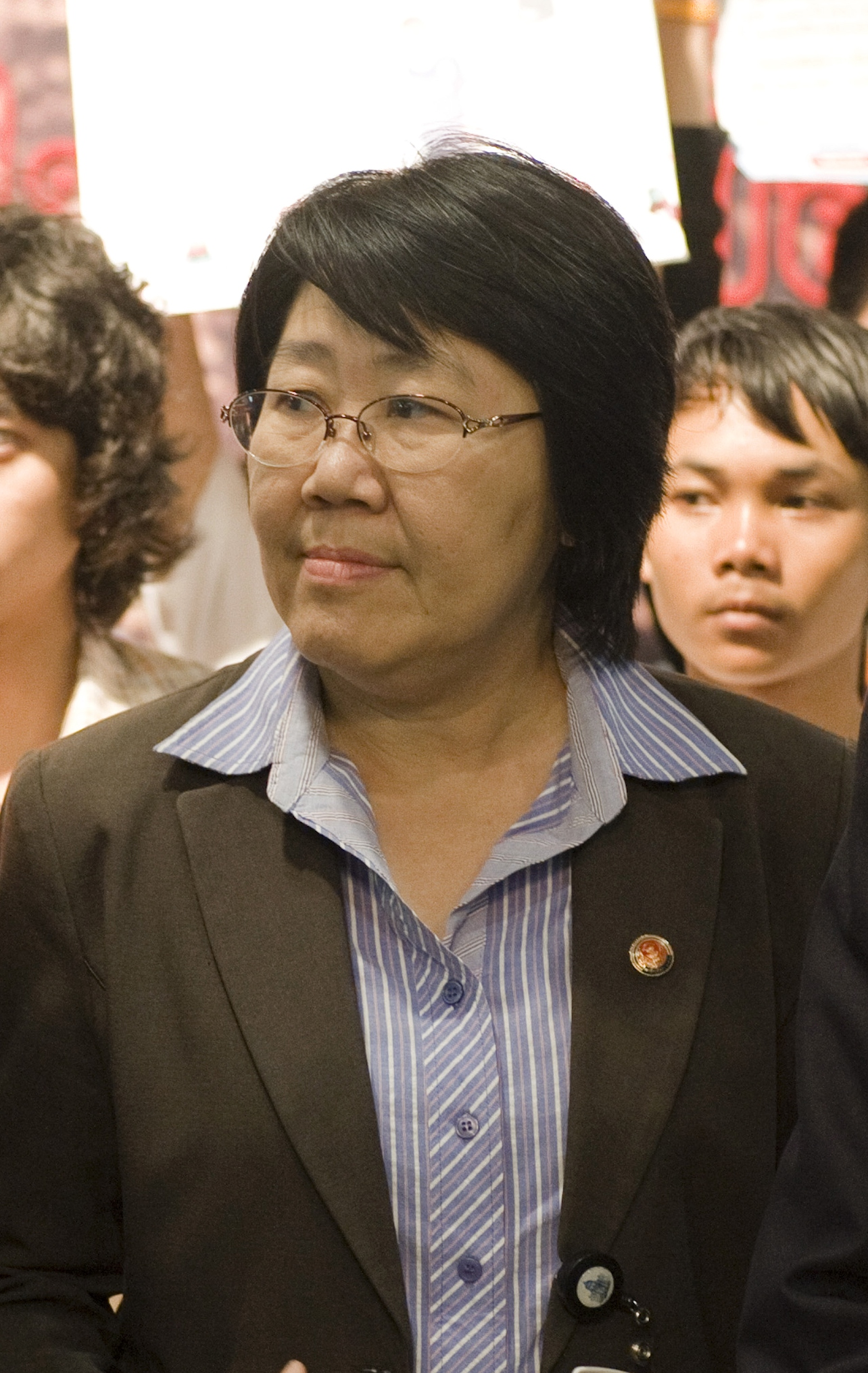 นางสาว รสนา โตสิตระกูล / คณะเยาวชนจากมูลนิธิ Asia จำนวน 100 คนเข้าเยี่ยมคารวะนายกรัฐมนตรี ณ โถงอาคารรัฐสภา วันพุธ ที่ 20 ตุลาคม พ.ศ.2553 (Photographer attached to the Prime Minister of the Kingdom of Thailand : Peerapat Wimolrungkarat / พีรพัฒน์ วิมลรังครัตน์)